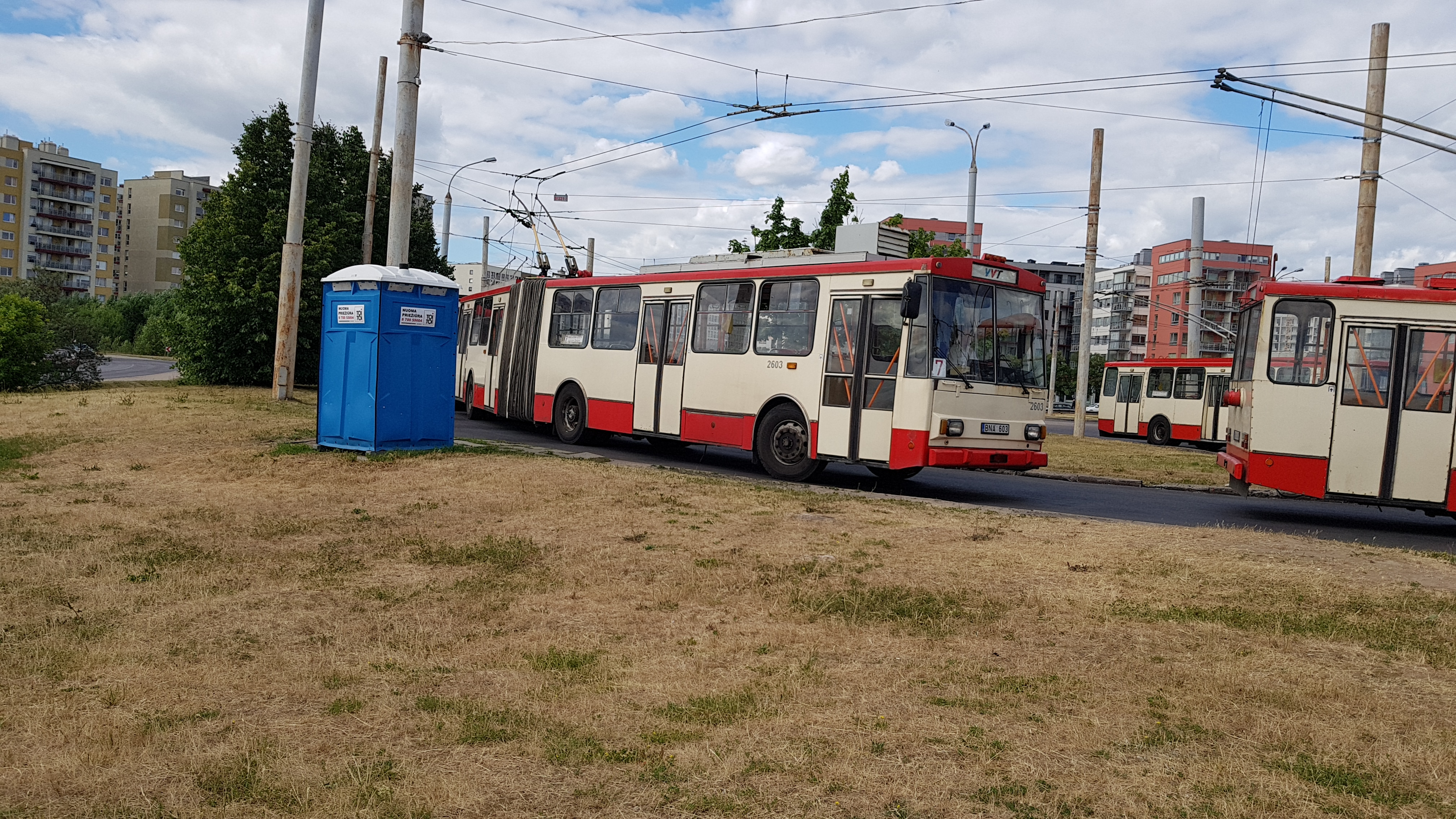 Škoda 15Tr Pašilaičiain päätepysäkillä Vilnassa, Liettuassa